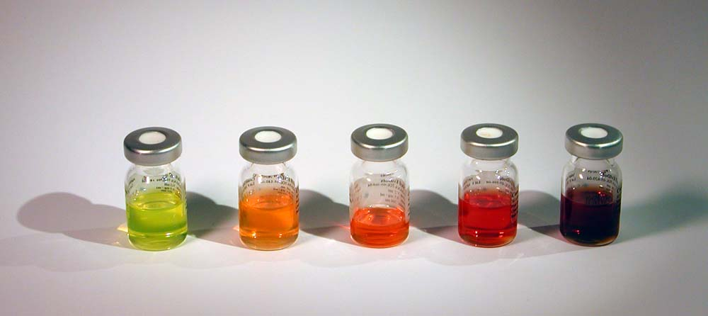 Quantenpunkte groß Dieses Bild ist von Gert Wrigge & Ilja Gerhardt im November 2003 aufgenommen worden. Es steht unter der GNU FDL & ist frei verfügbar.